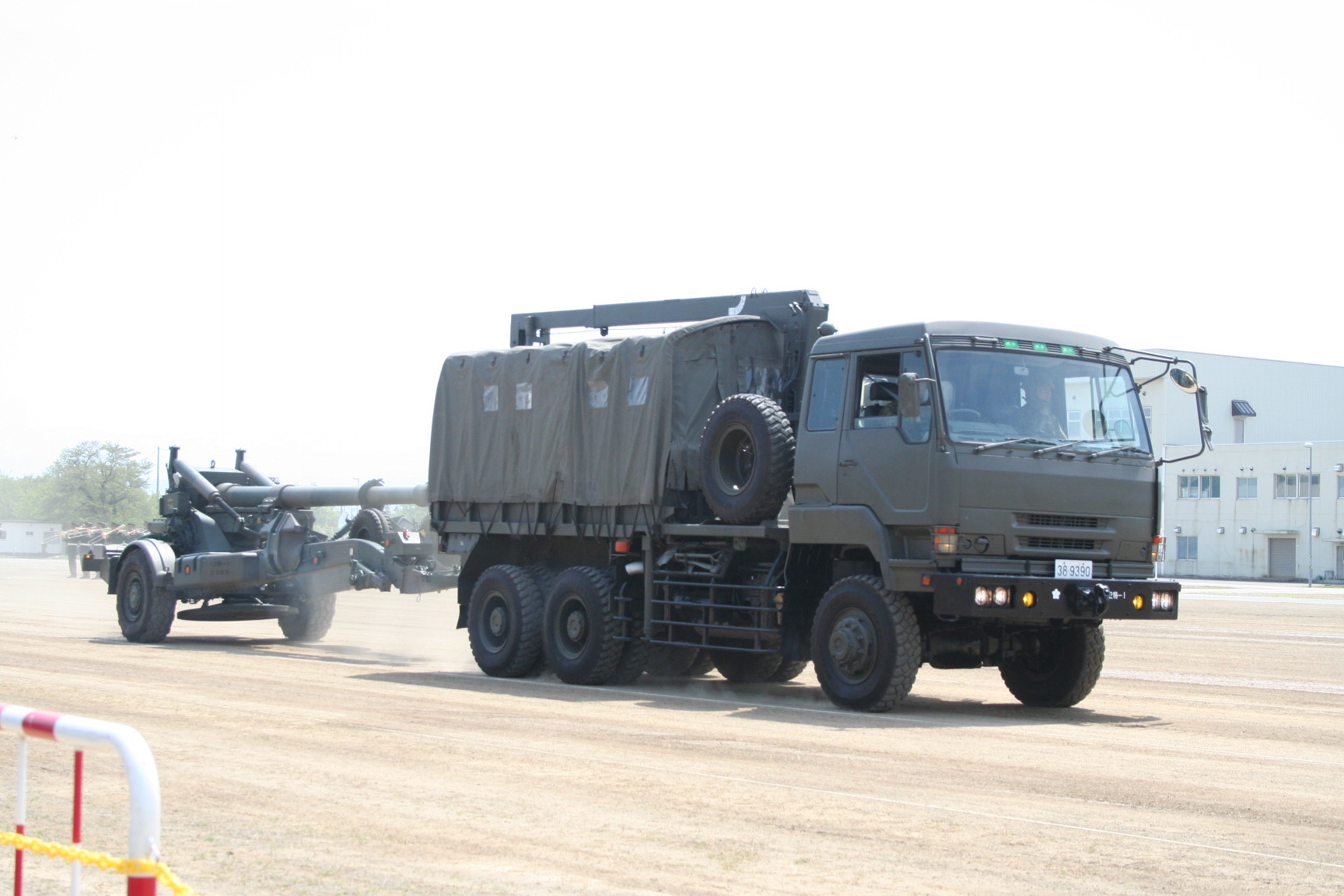 2018年4月22日撮影